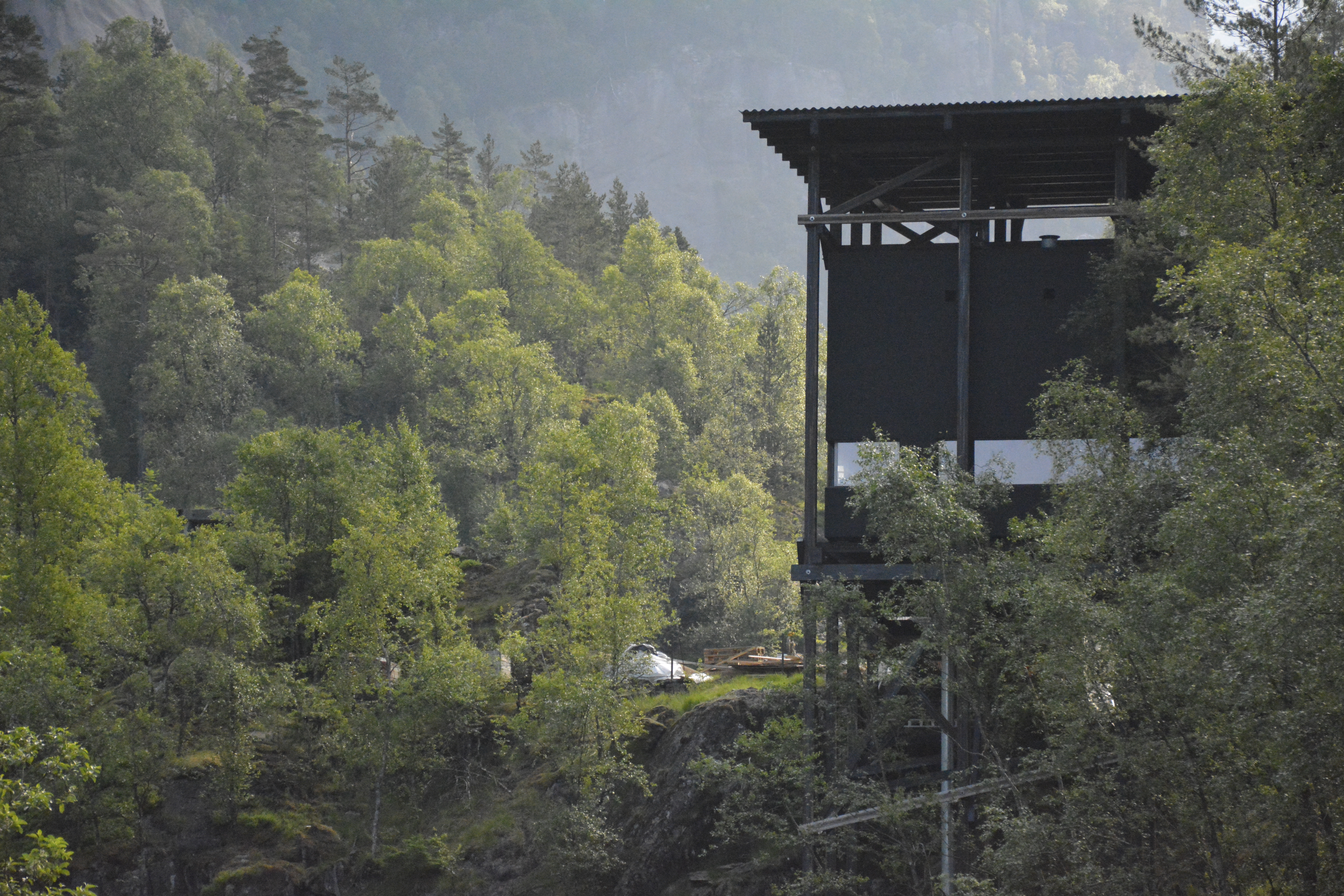 En av tre bygg tegnet av Peter Zumptor for det nye museet om gruvehistorien i Allmannajuvet